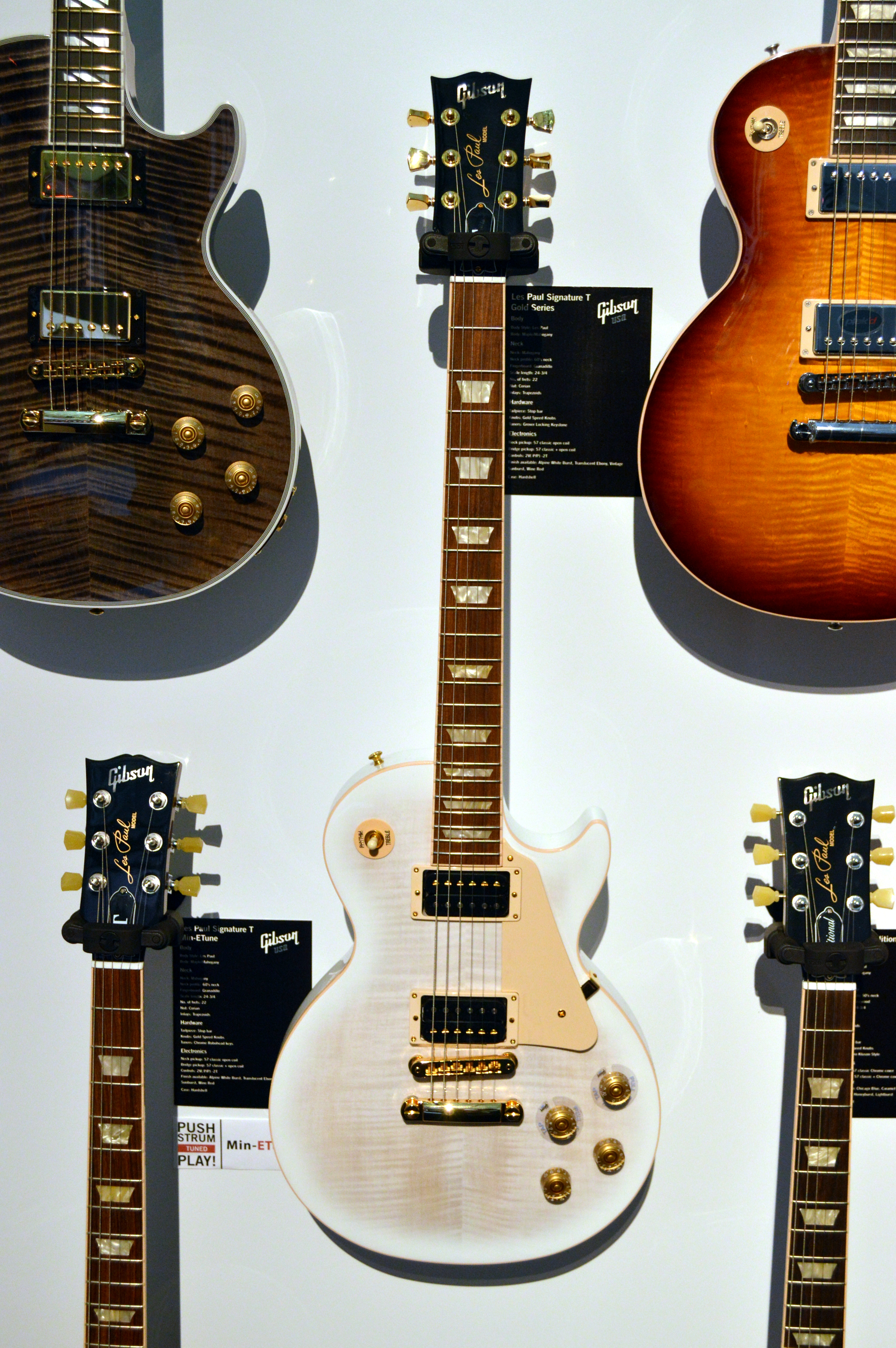 Gibson Les Paul Signature "T" Mini-ETune, CES2013